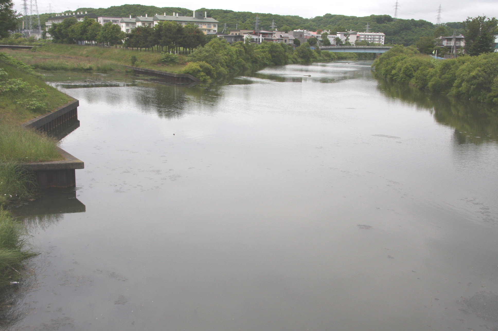 苫小牧川 有珠川橋より上流を望む